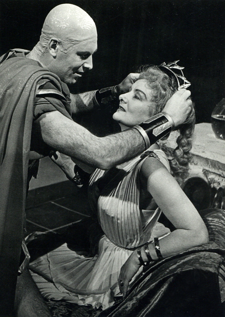 Miroslav Krleža, Aretej ali Legenda o sveti Ancili, Drama SNG v Ljubljani. Na fotografiji: Boris Kralj (Gaj Anicij Sever), Sava Sever (Livia Ancila).